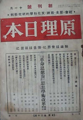 『原理日本』は、昭和9年（1934年）から原理日本社から発行された、戦前昭和の総合雑誌。